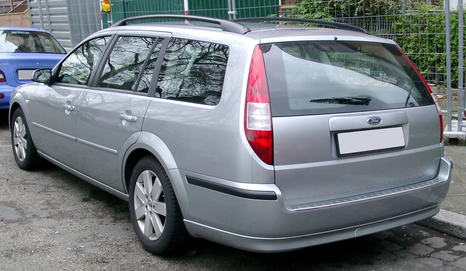 Ford Mondeo Turnier, 2. Generation